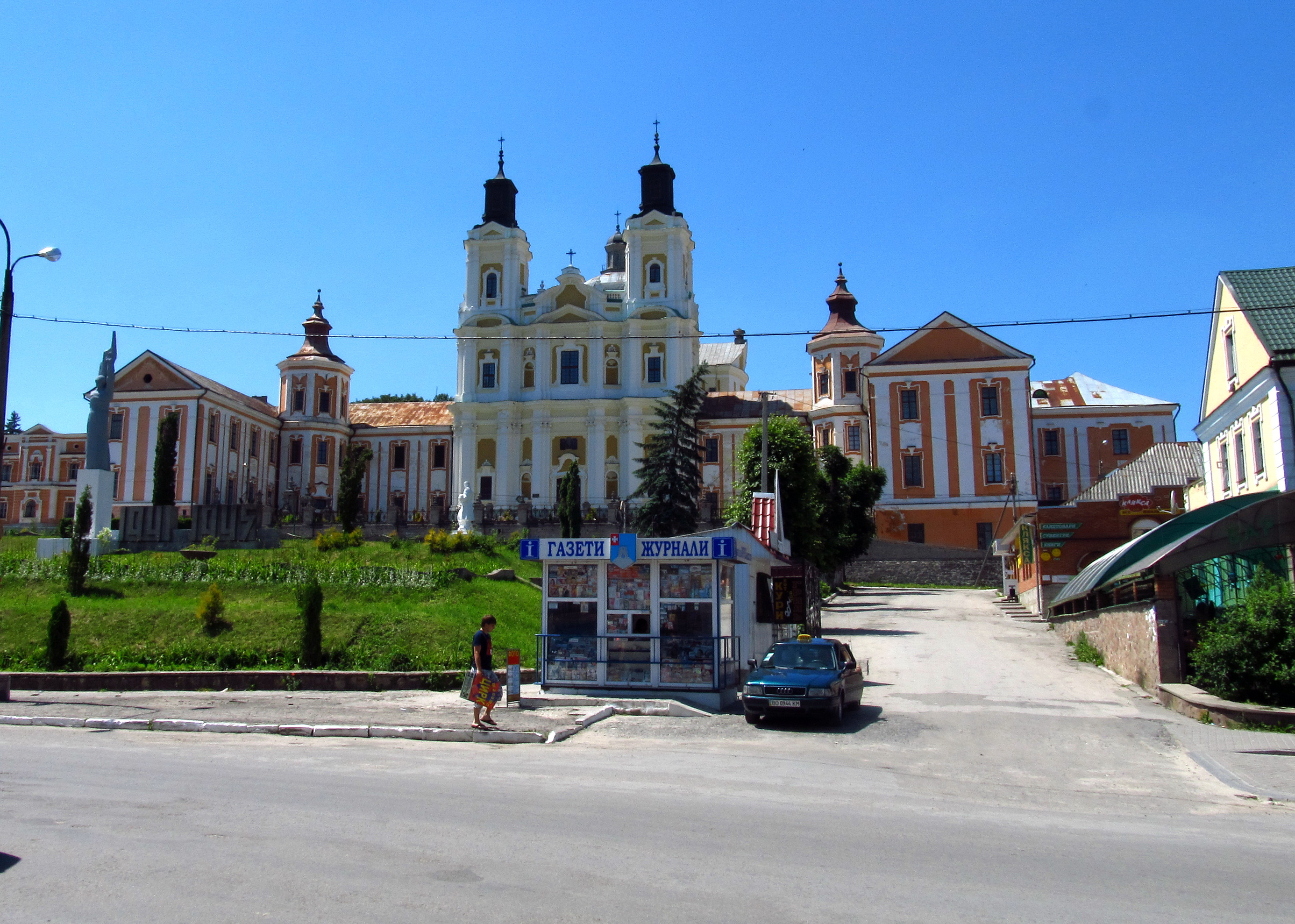 Кременець вул. Ліцейна, 1